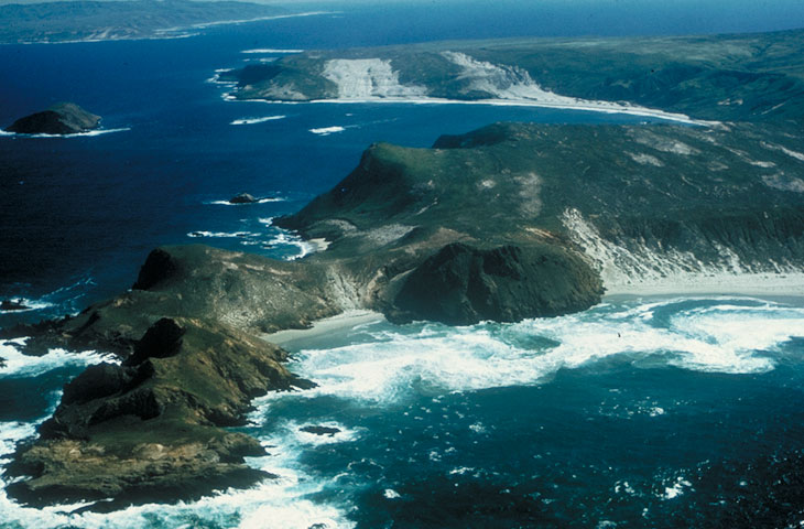 Wilder Küstenabschnitt der Channel Islands, Kalifornien - Channel Islands National Park